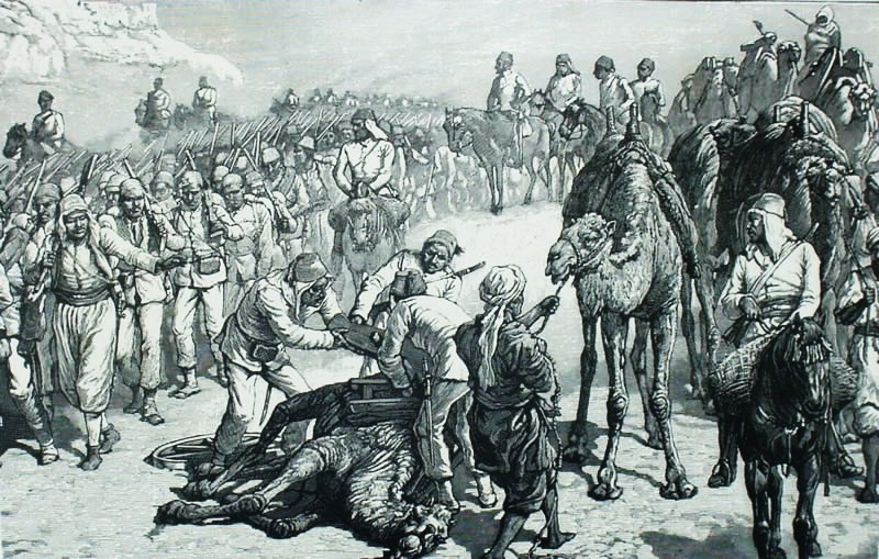 L'armée de Hicks pasha en marche. Gravure parue dans le Graphic en 1883.